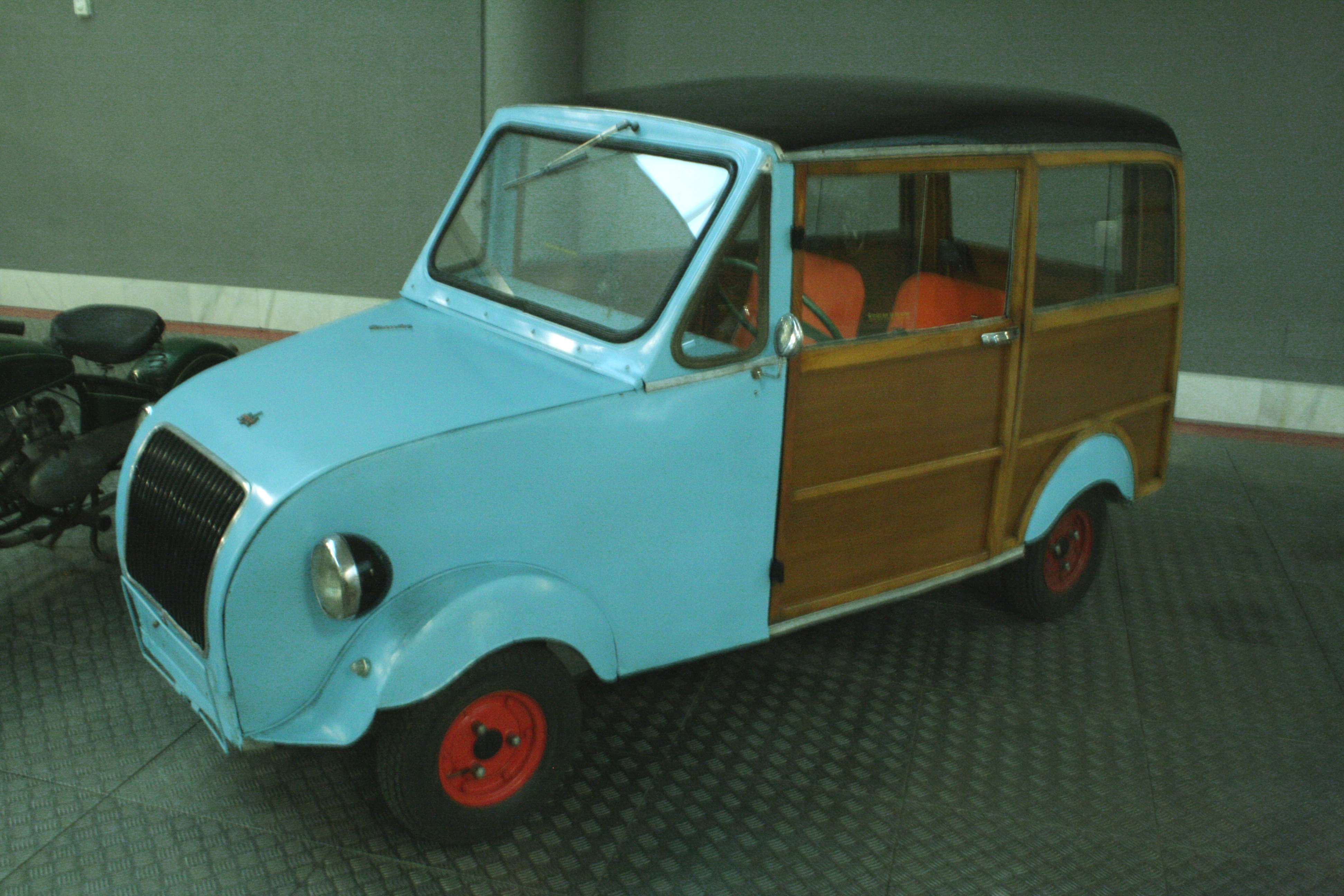 Biscuter Voisin